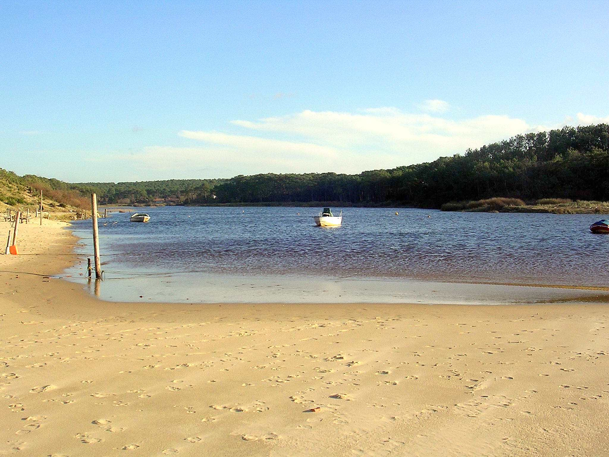 Courant de Contis, dans le département français des Landes.